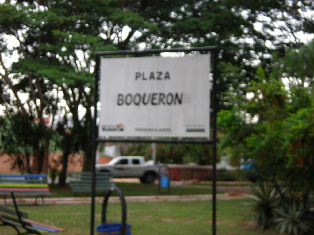 plaza